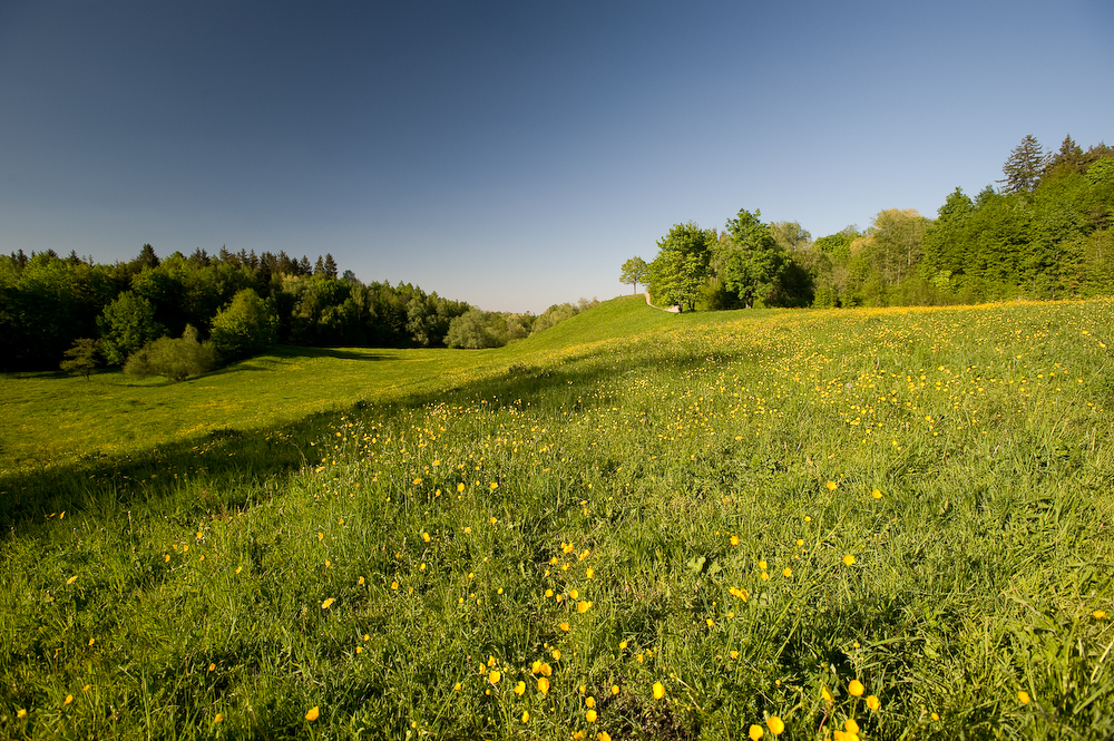 Aubinger Lohe, Puchheim